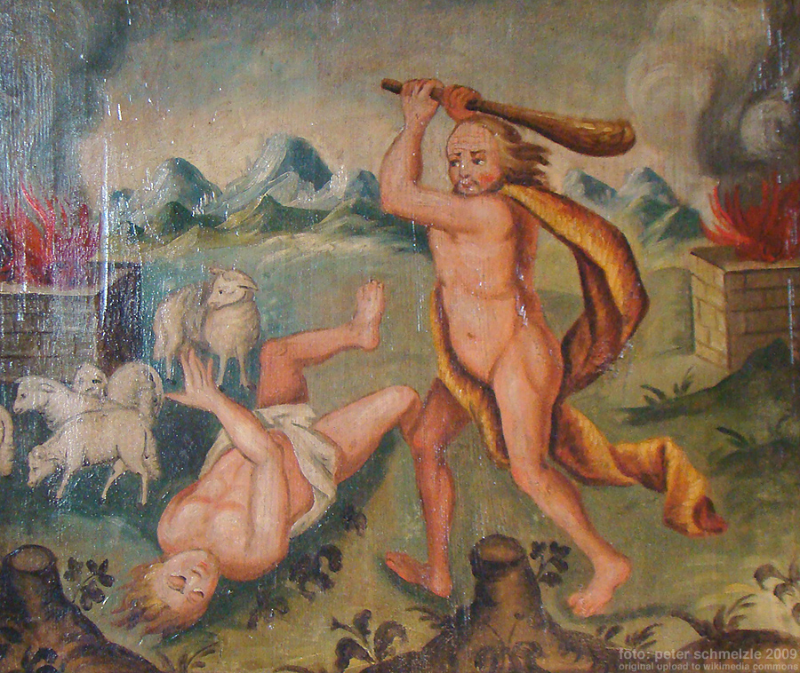 Malereien um 1748 von Johannes Stigler in der Kilianskirche in Bretzfeld-Waldbach